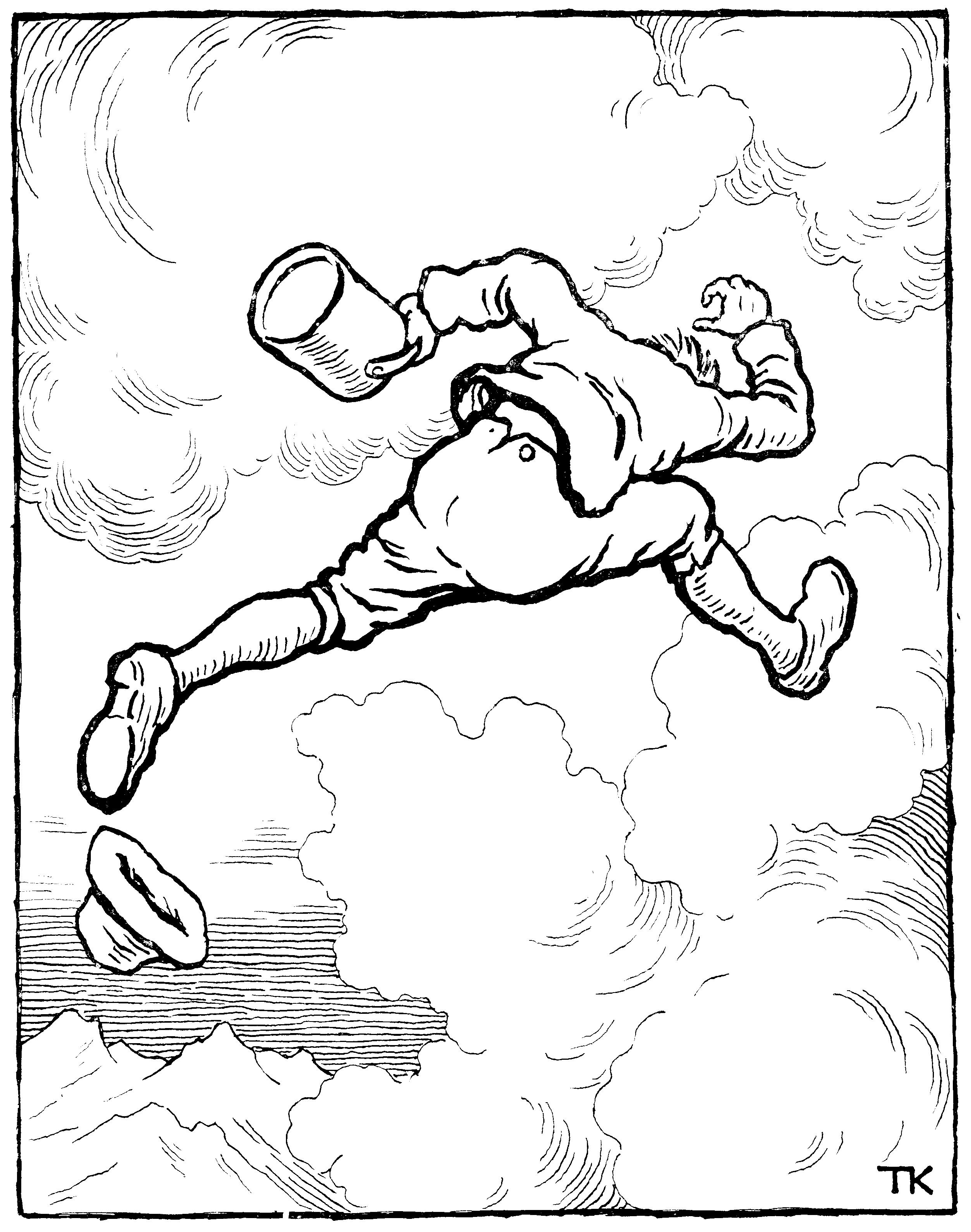 Illustrasjon til folkeeventyret Askeladden og de gode hjelperne «Han tok av loddene, fikk et spann, la i vei og vekk var han med det samme.» Scanned illustration from 1936 edition of Asbjørnsen & Moe: Samlede eventyr. Norske kunstneres billedutgave. Gyldendal Norsk forlag.